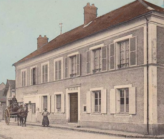 Mairie de Esmans vers 1910 carte postale colorisée